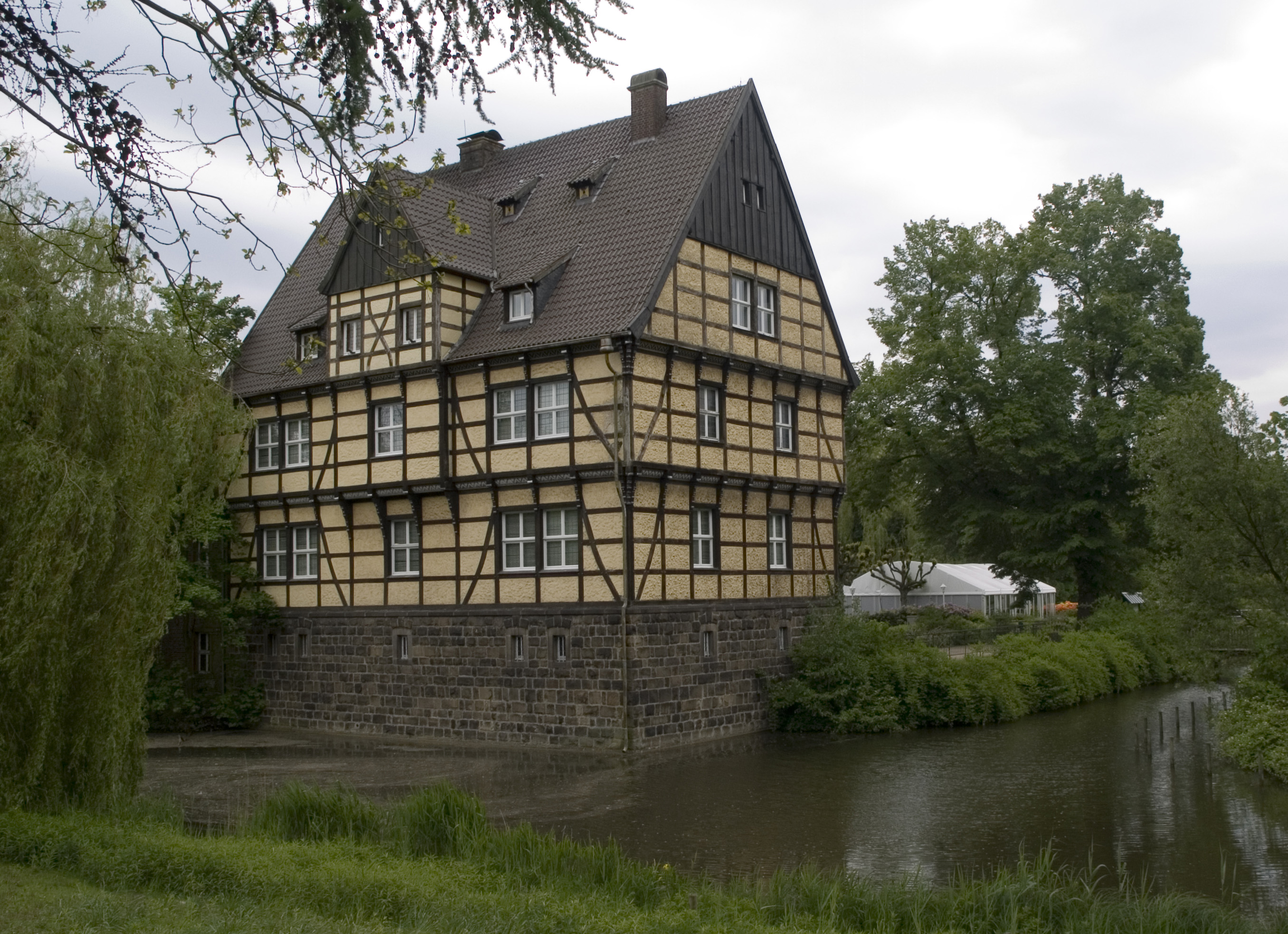 Северный Рейн-Вестфалия, Гладбек – Замок Витринген